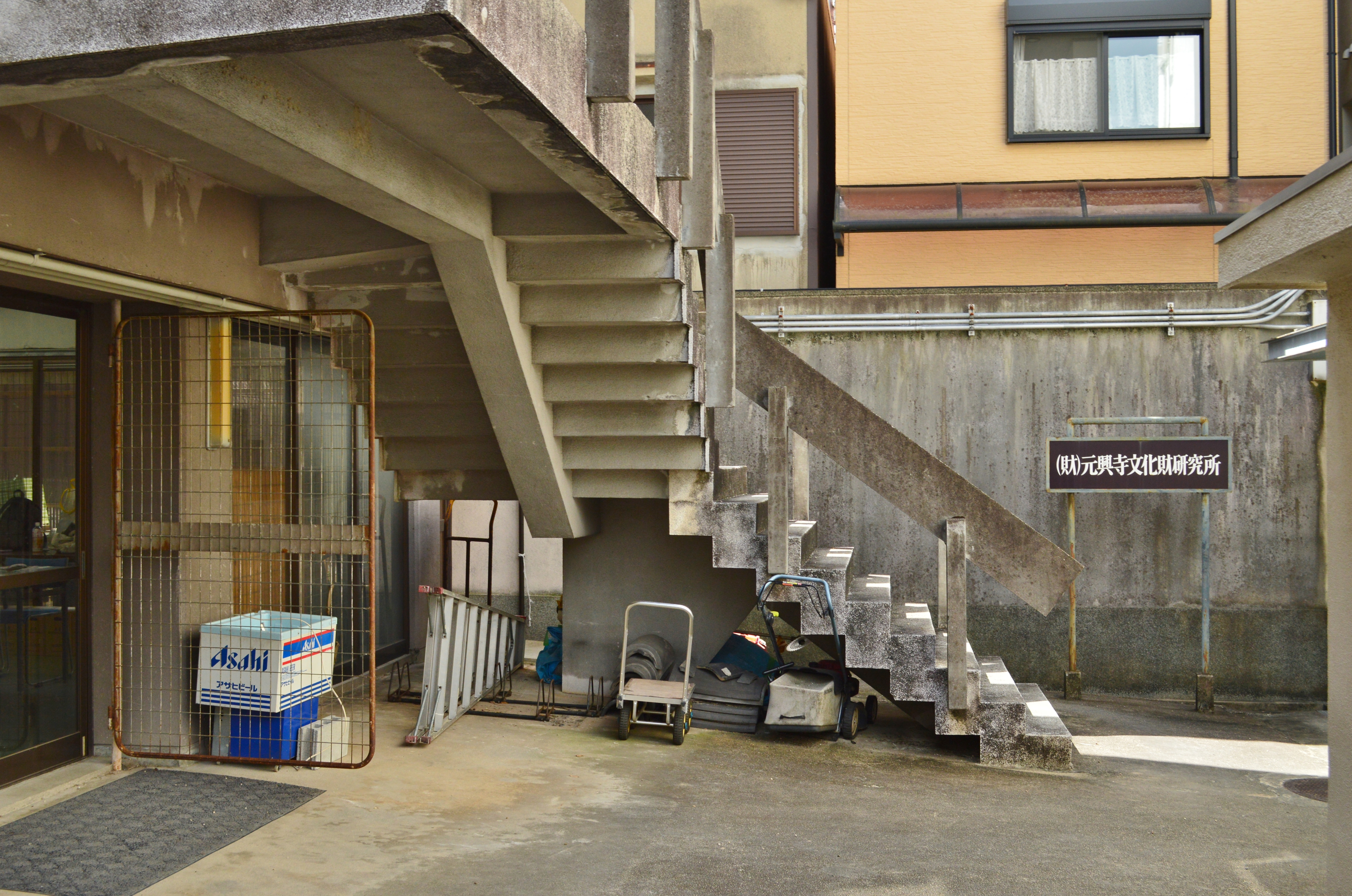 元興寺極楽坊 元興寺文化財研究所